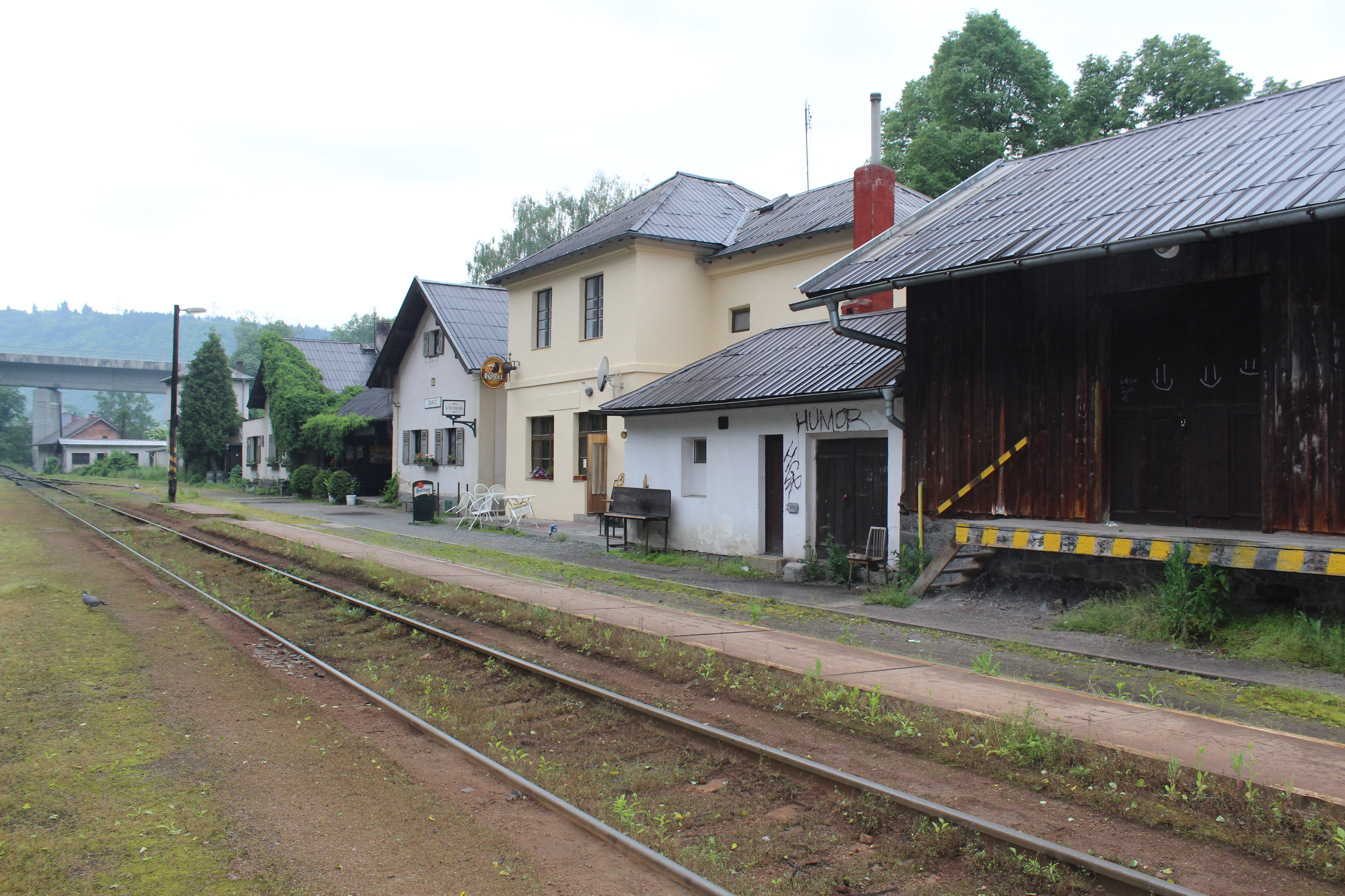 Davle nádraží z kolejiště